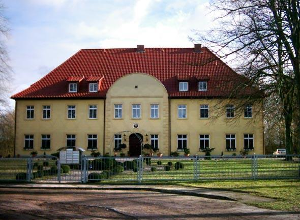 Herrenhaus Wohrenstorf